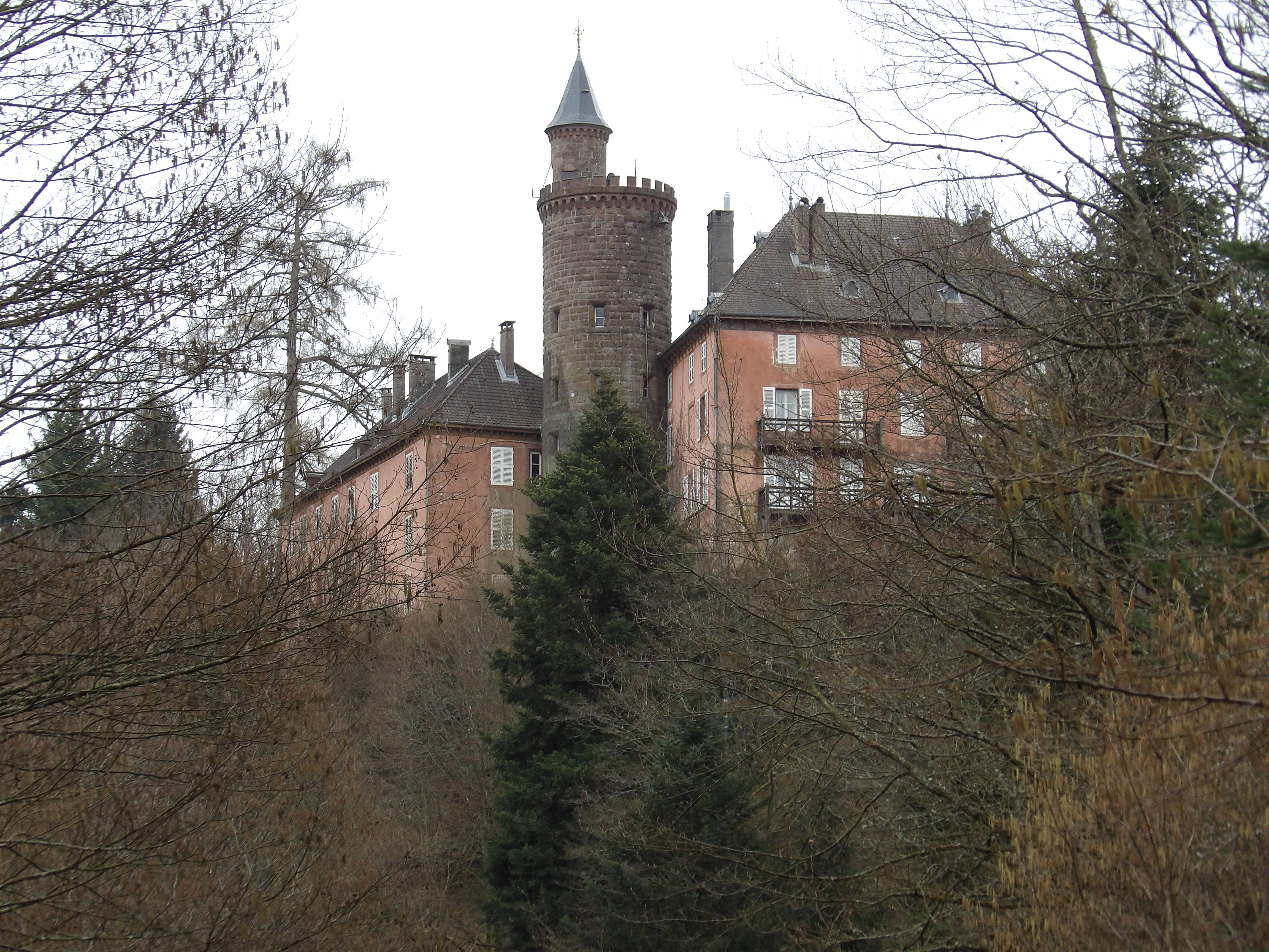 Domaine du château de Châtillon